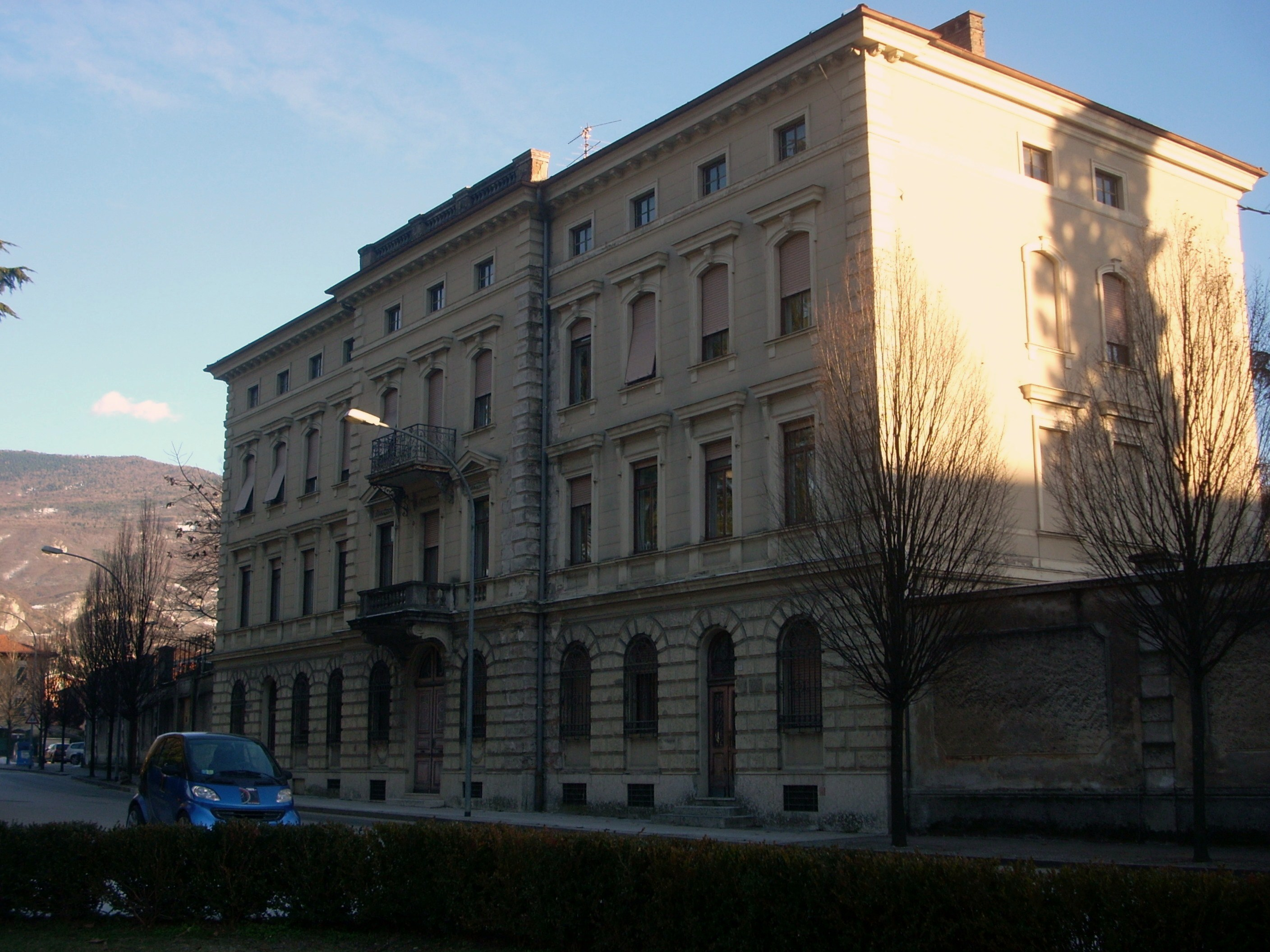 Manifattura tabacchi di Rovereto, lato nord